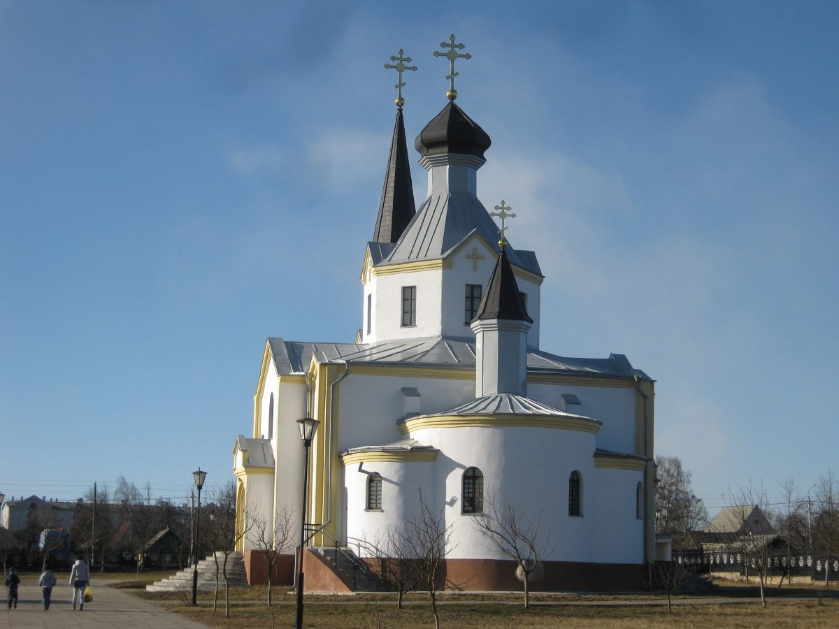 Касцюковічы. Крыжаўзвіжанская царква